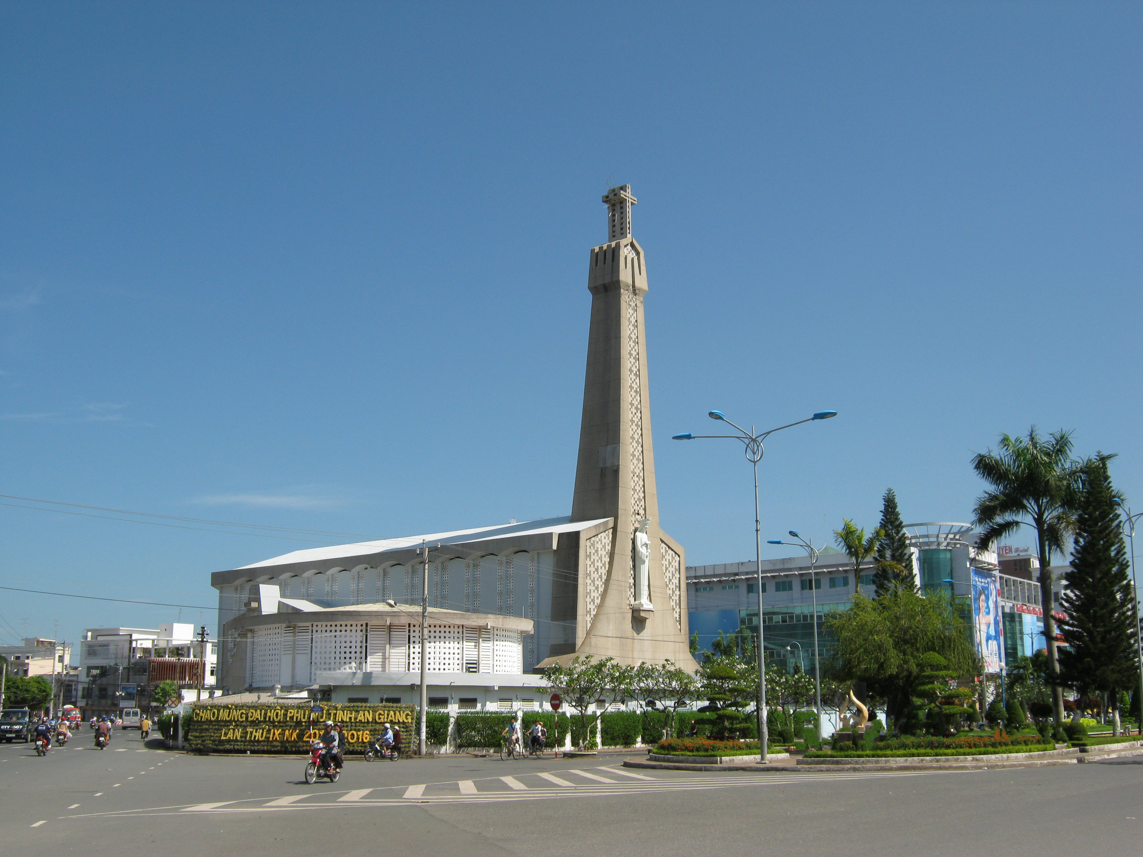 Nhà thờ chính tòa Long Xuyên (An Giang, Việt Nam)